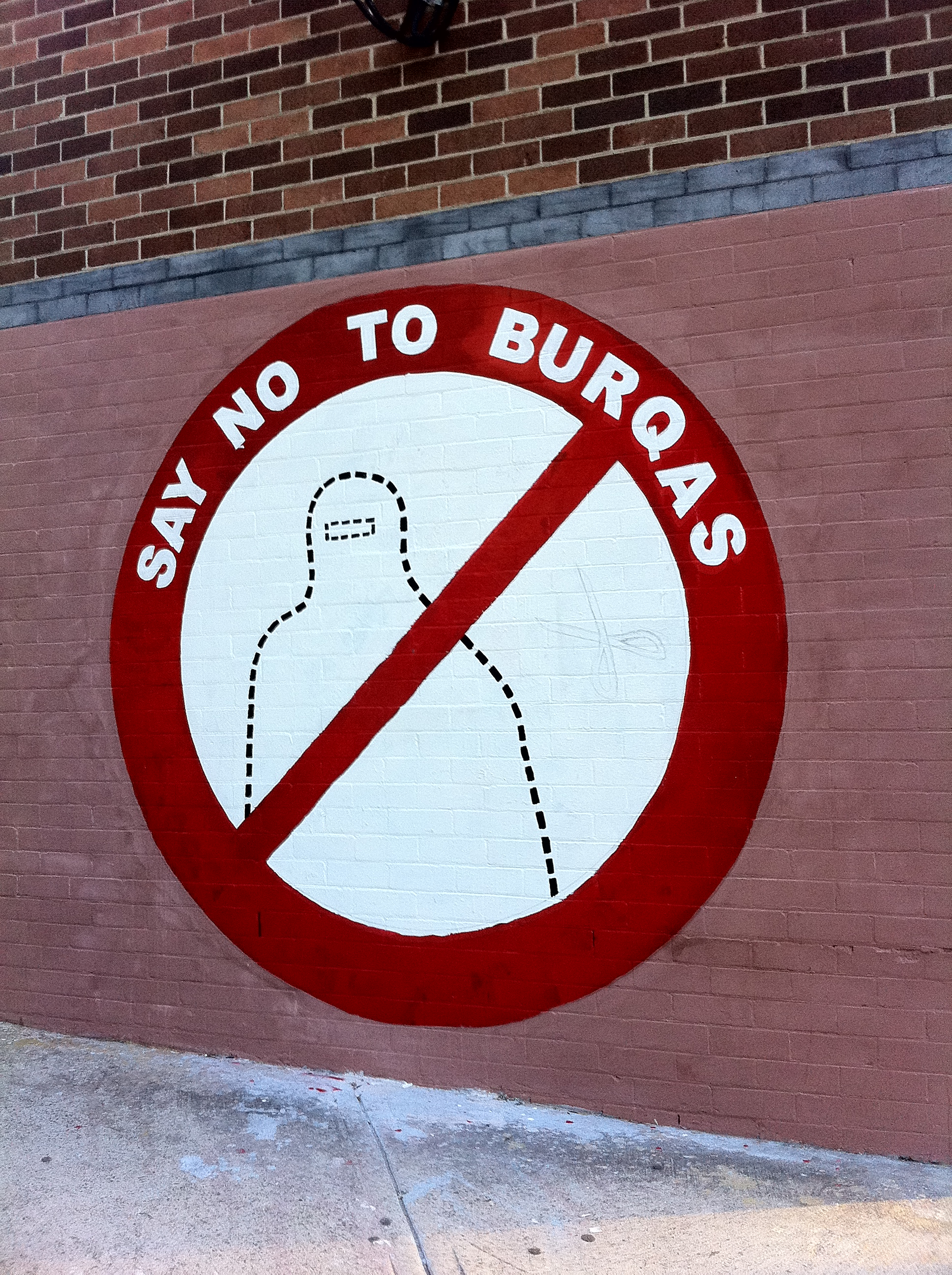 Say no to Burqas